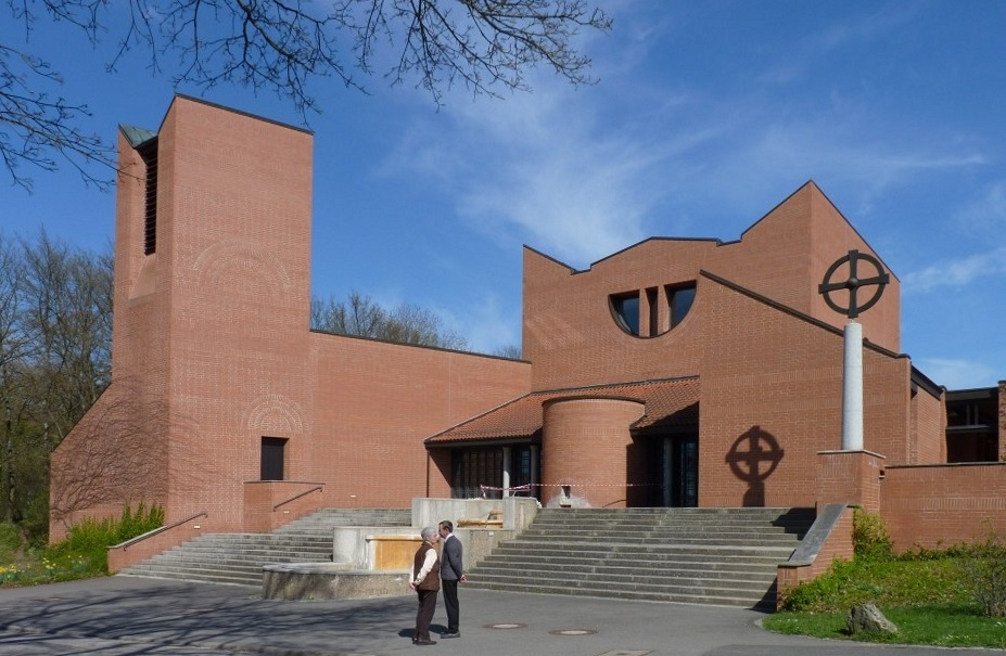 St.-Michaels-Kirche, Schwanberg